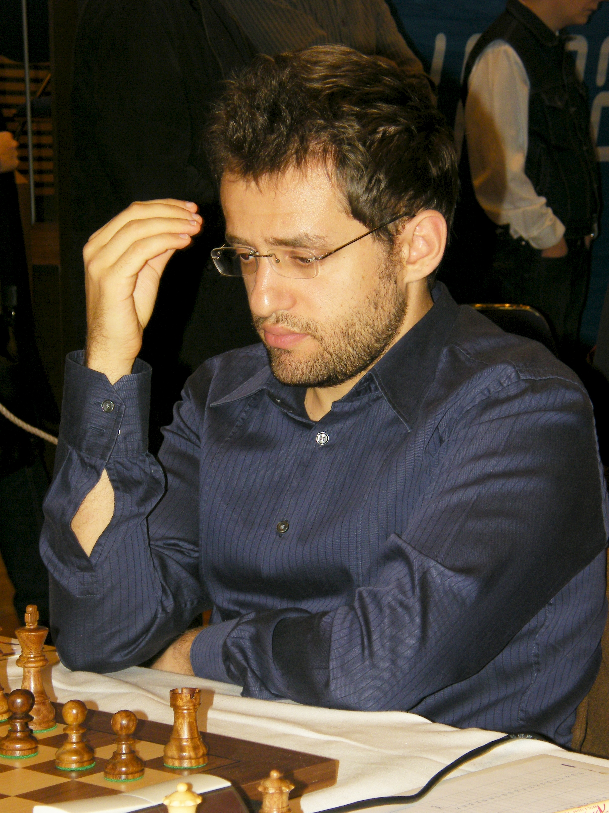 Lewon Aronjan bei der 38. Schacholympiade in Dresden 2008